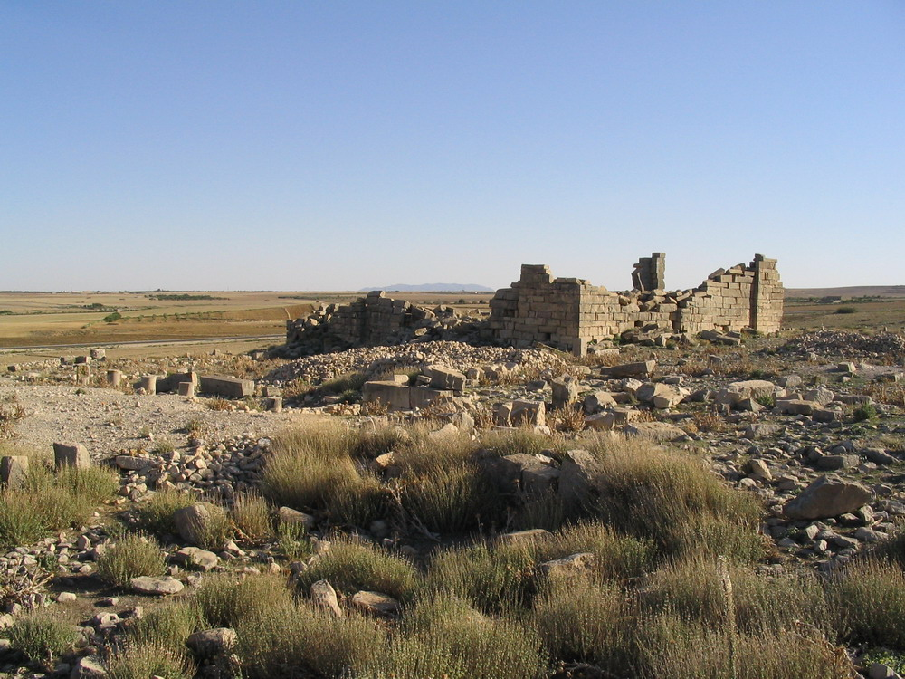 Ruines de la ville romaine et du fort byzantin